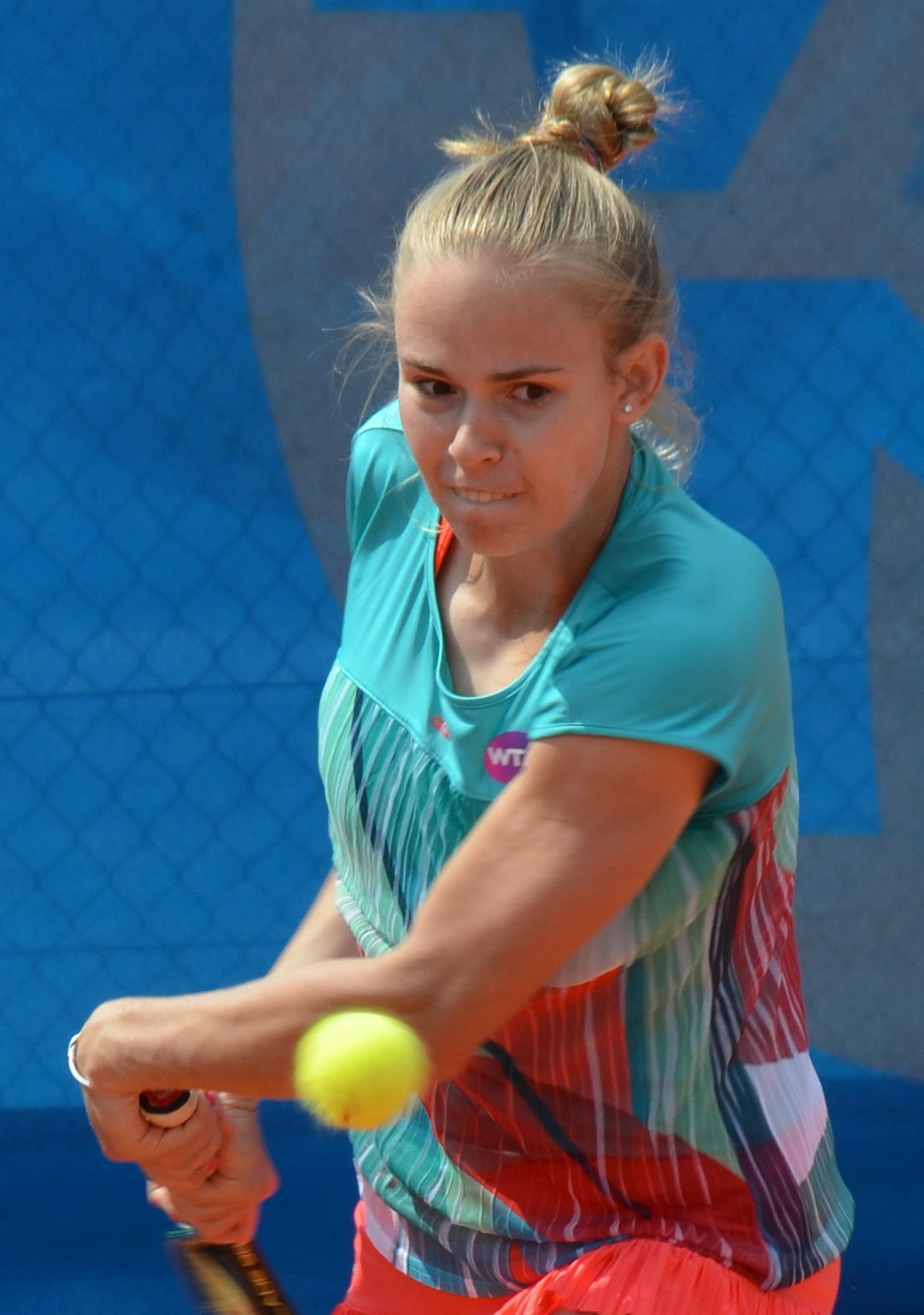 Olga Fridman bei der Qualifikation zum Nürnberger Versicherungscup 2016 im Erstrundenmatch gegen Jovana Jaksic